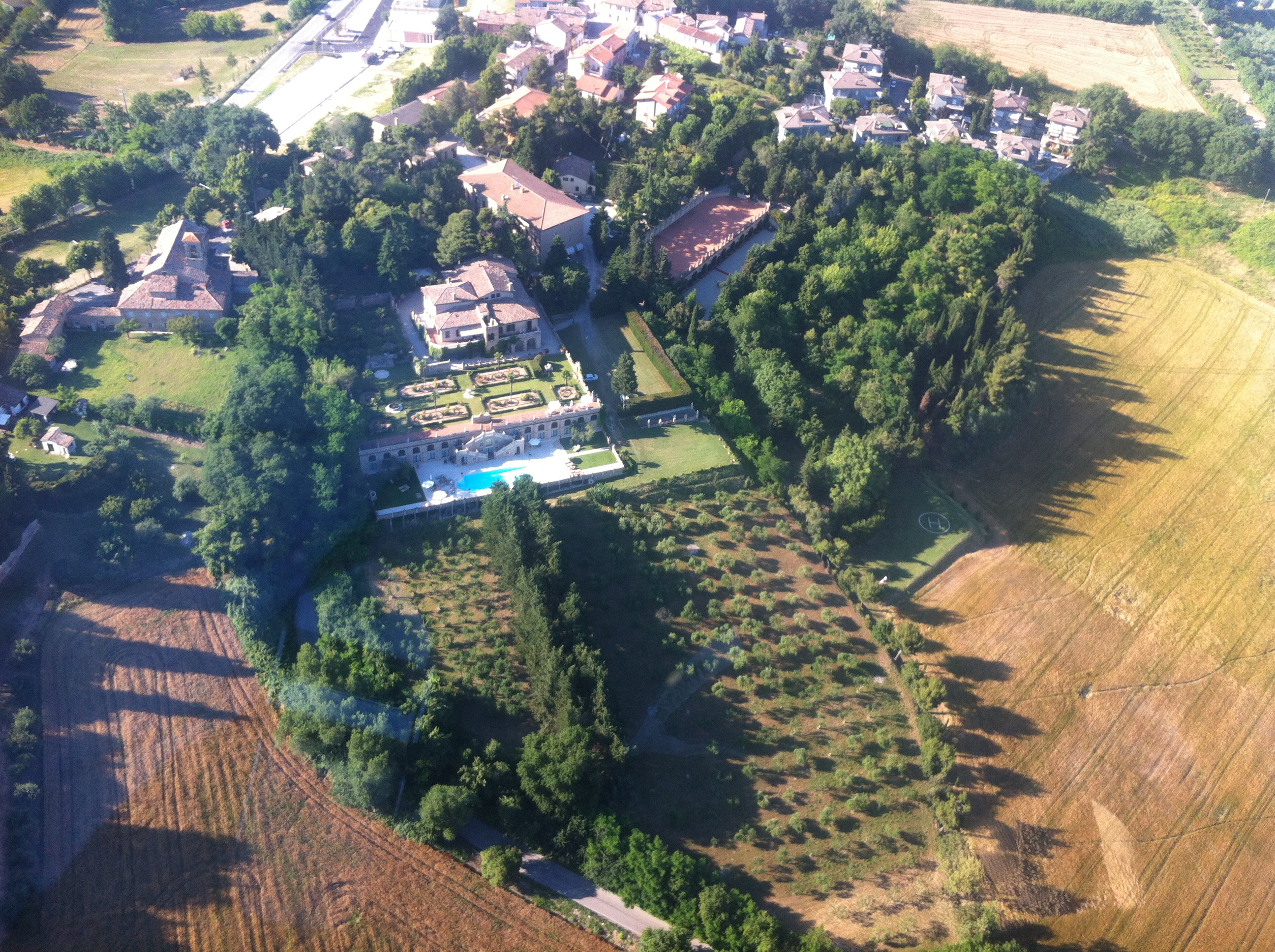 Foto aerea di Villa Cattani Stuart